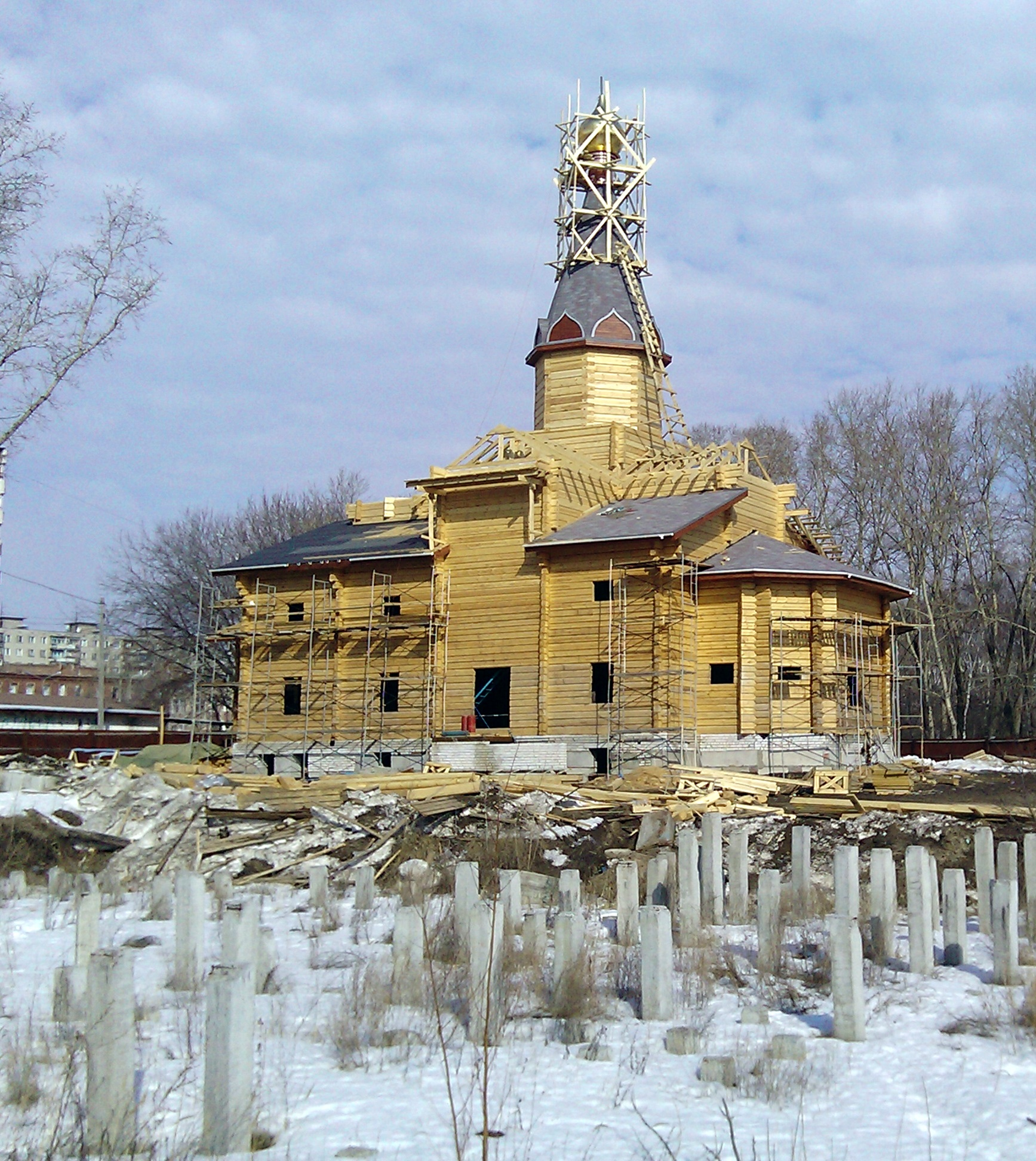 Церковь иконы Пресвятой Богородицы «Умиление»